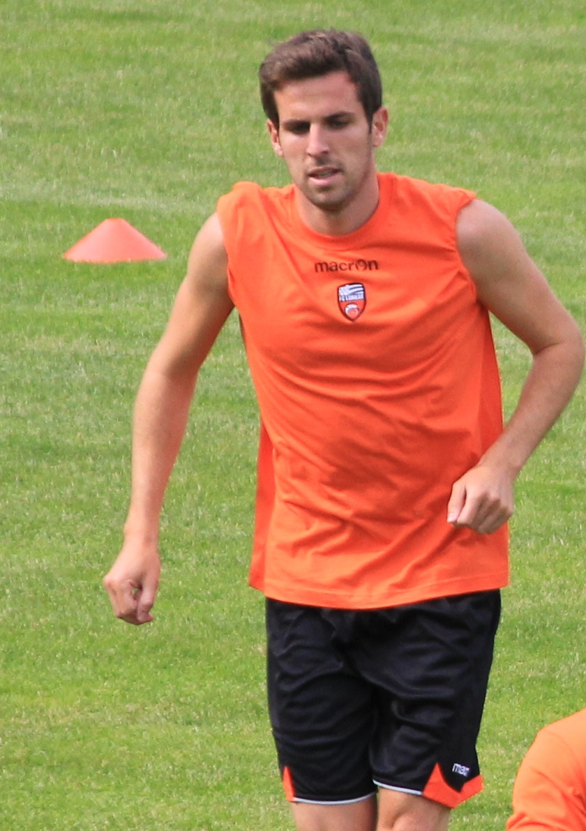 Benjamin Corgnet lors de la reprise de l'entrainement du FC Lorient le 27 juin 2013